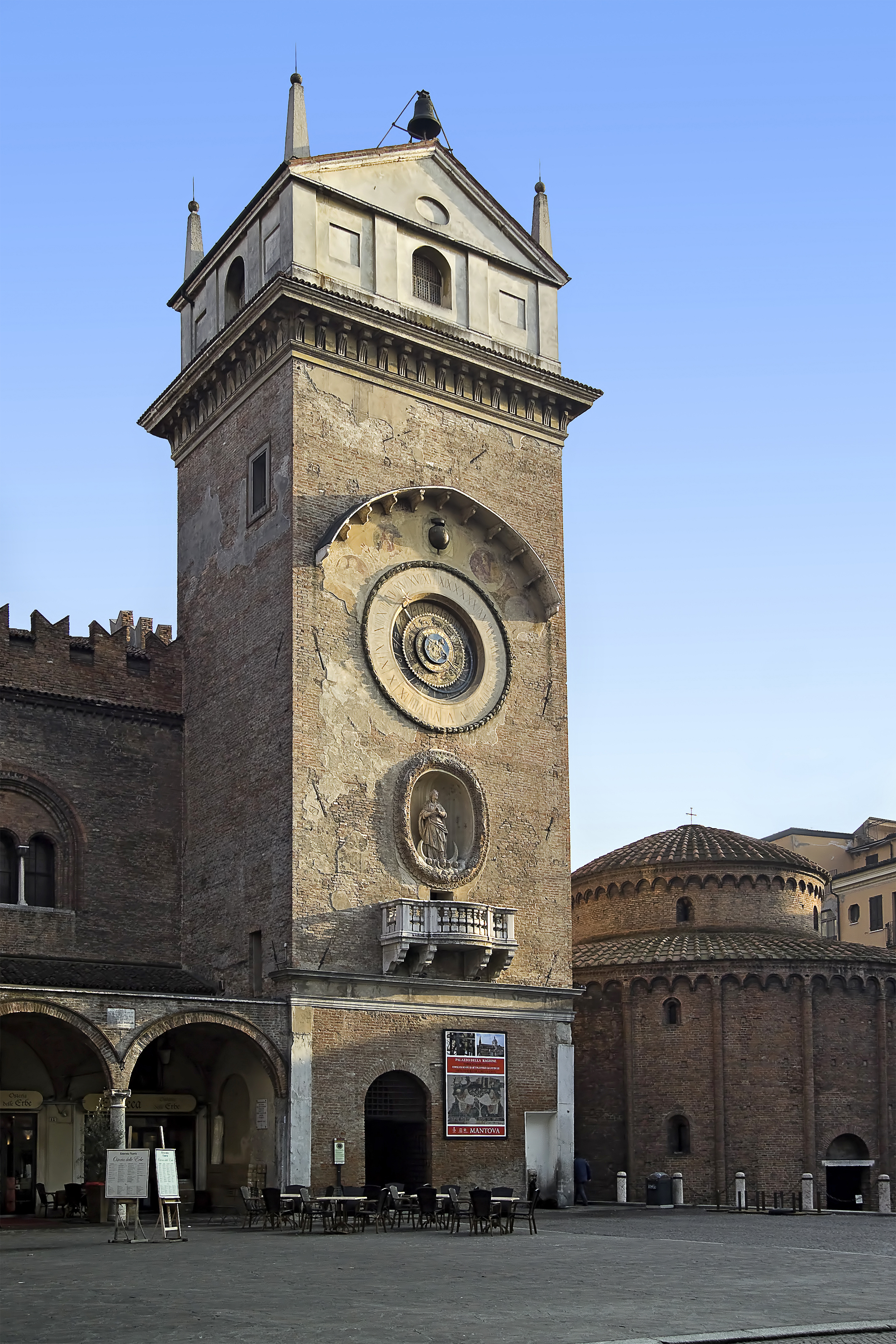 Mantova in piazza delle Erbe la Torre dell'orologio This is a photo of a monument which is part of cultural heritage of Italy.